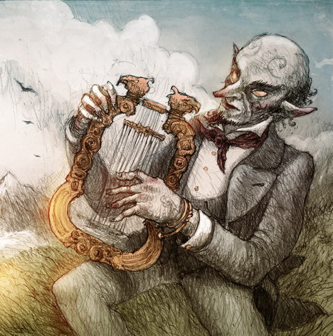 Bard Taog na dvoře pána Eacharna Oisisana (při zpěvu Moireach, krátce předtím než byl vyhnán pro svedení královniny dámy)